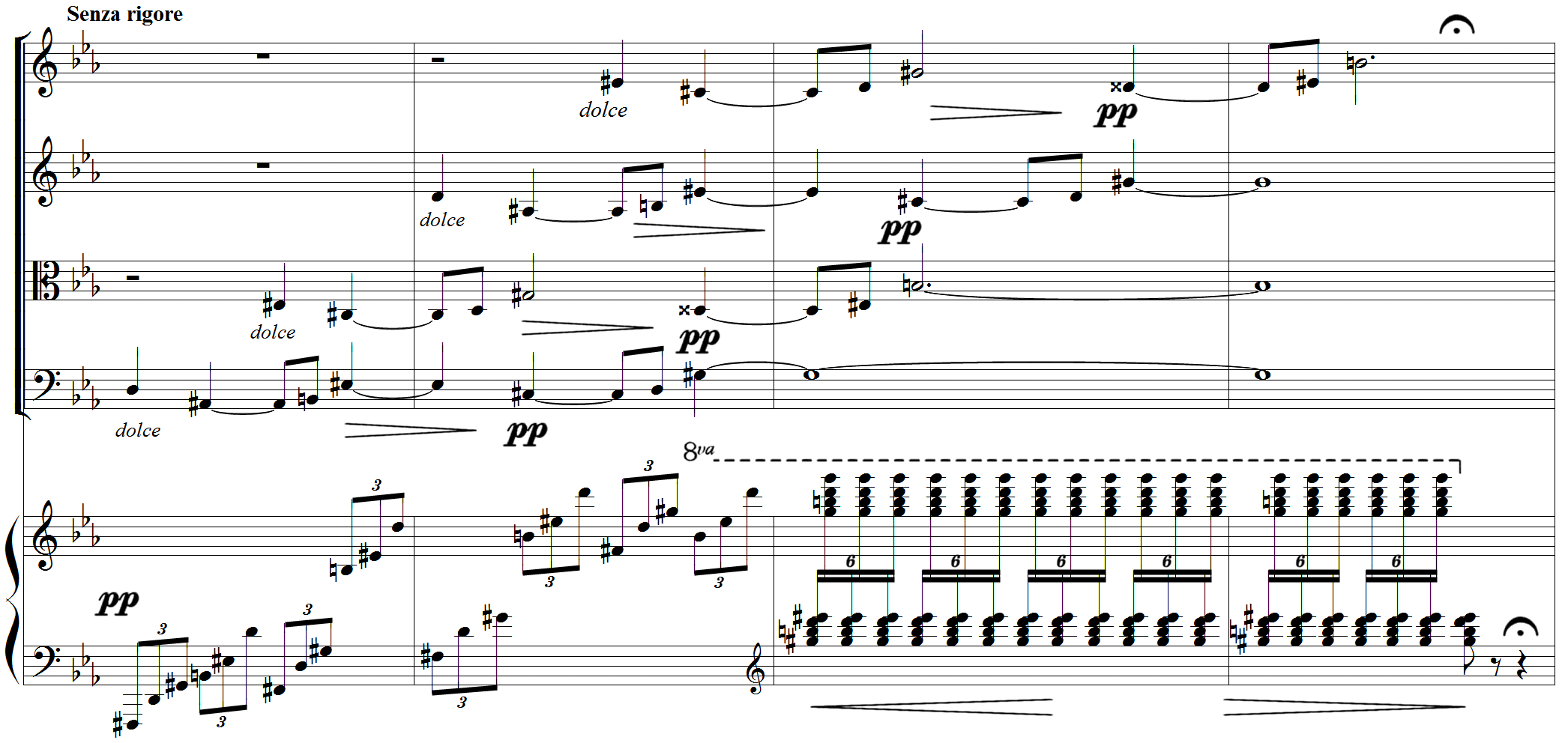 Quintette pour piano et cordes op.42 de Louis Vierne - 3ème mouvement "Senza rigore"